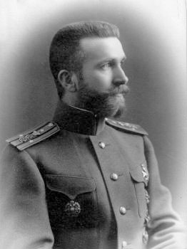 Erwin (Vladimir) Rahr, (1880-1919), kaiserl.-russ. Oberst, Teilnehmer des Russ.-Japan. Krieges 1904-1905